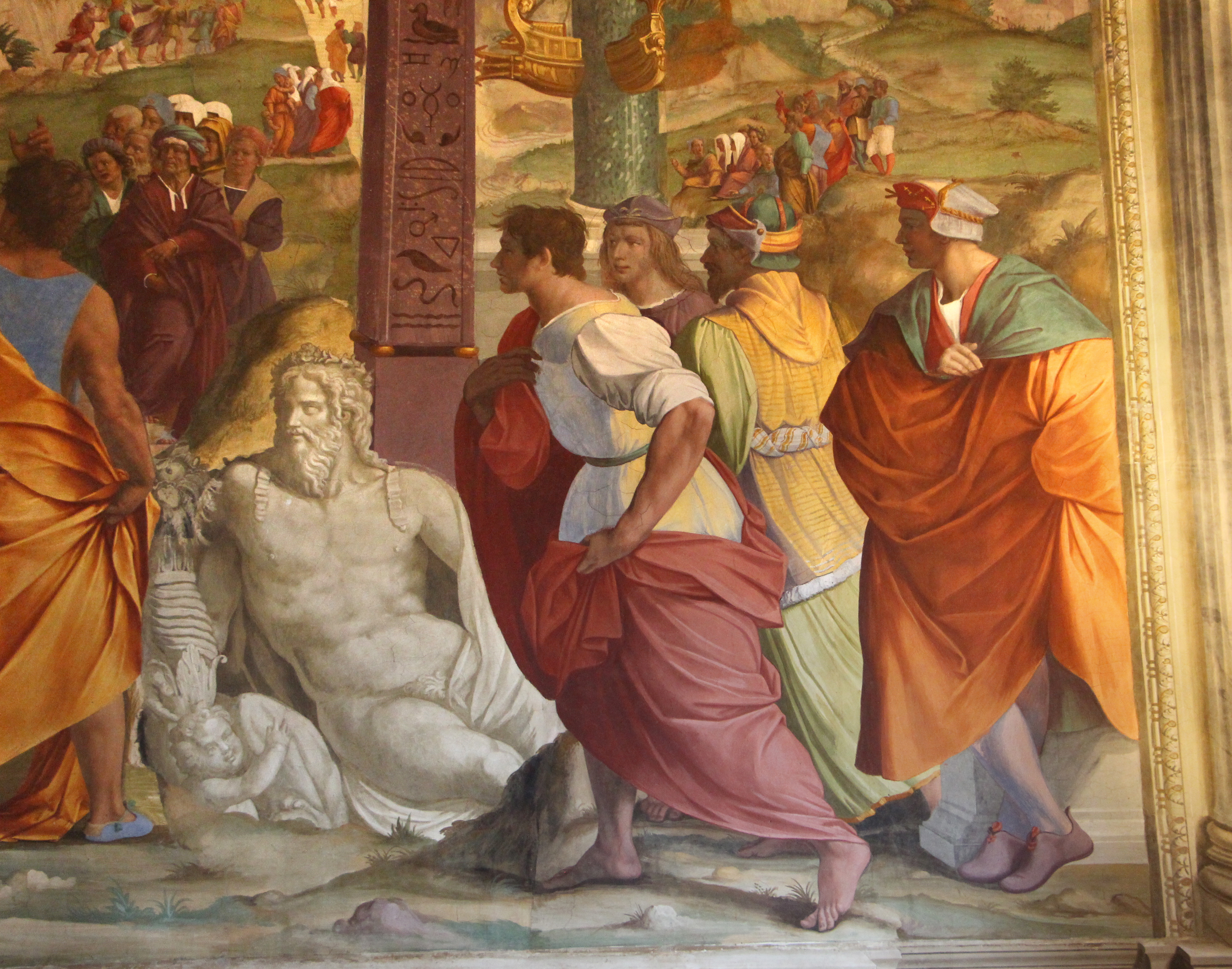 Villa medicea di Poggio a Caiano - MIBAC The making of this document was supported by Wikimedia CH. (Submit your project!) For all the files concerned, please see the category Supported by Wikimedia CH. This is a photo of a monument which is part of cultural heritage of Italy.